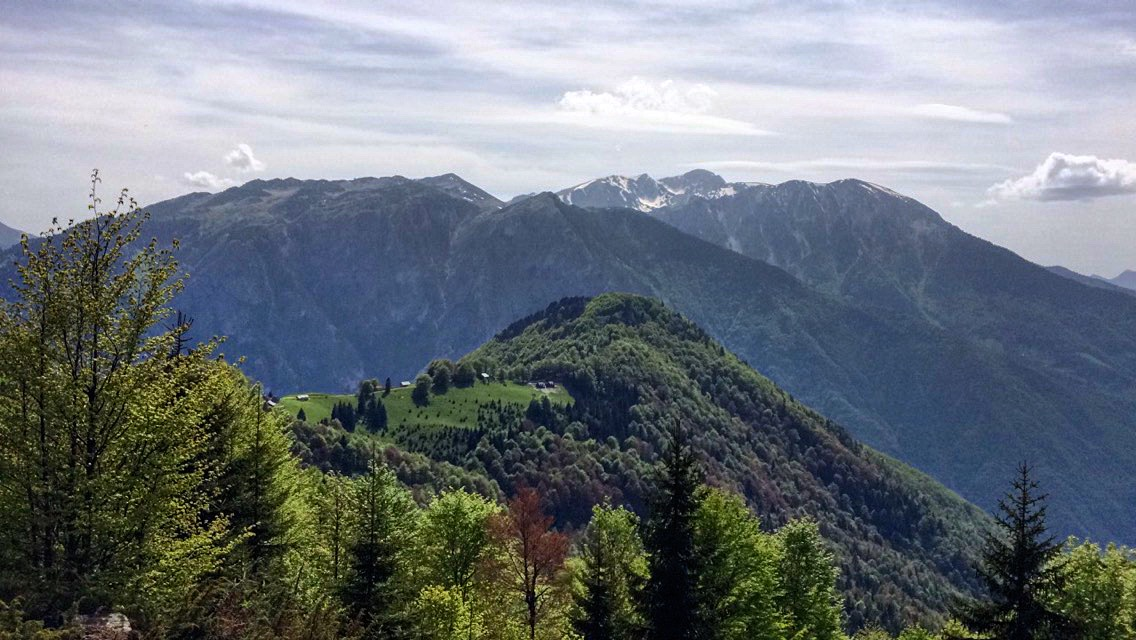 Parku Kombëtar Bjeshkët Nemuna, Pejë